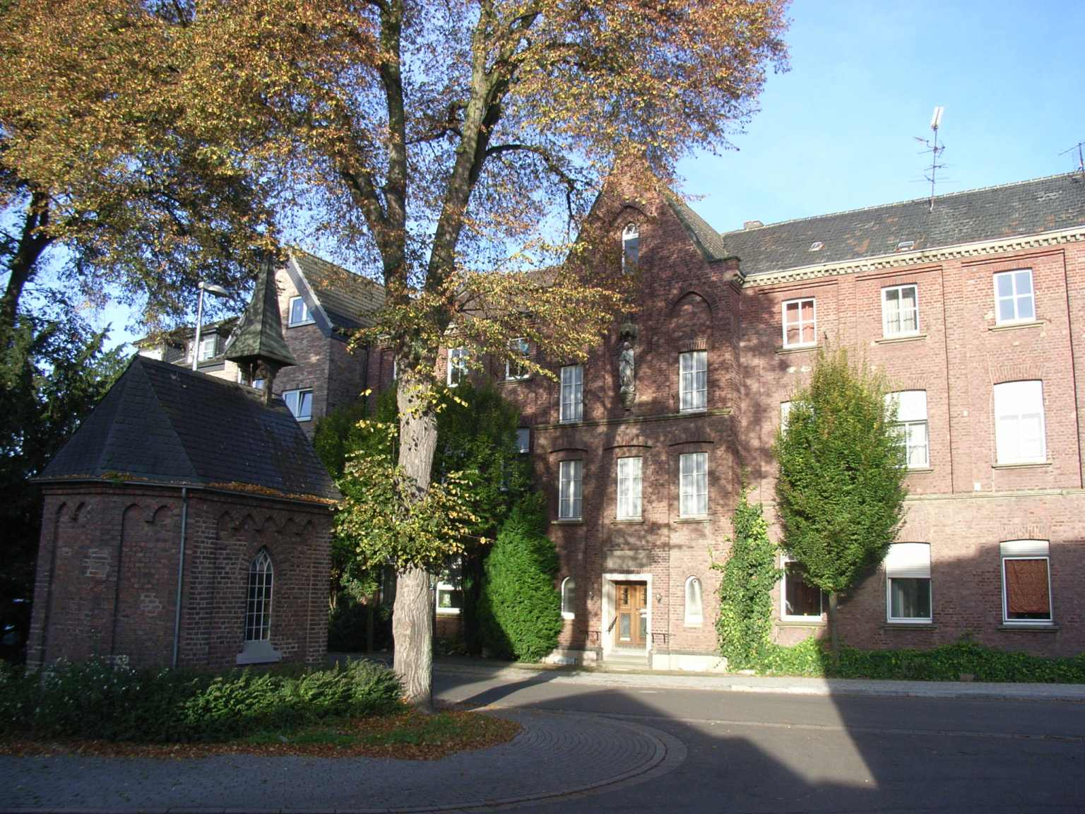 ehemaliges Krankenhaus am Gasberg, Lövenich (Erkelenz) NRW